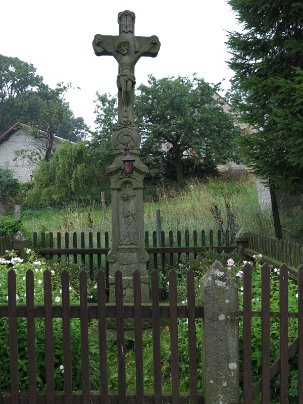 Krucifix, na návsi, Slavný.